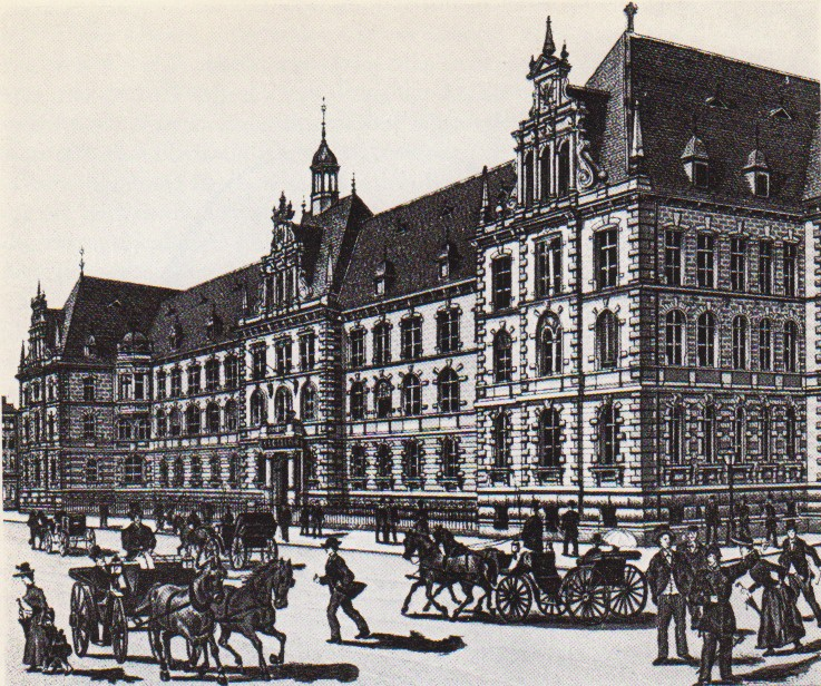 "Justizpalast" auf dem Klapperfeld in Frankfurt am Main, 1889, Sitz verschiedener Gerichte